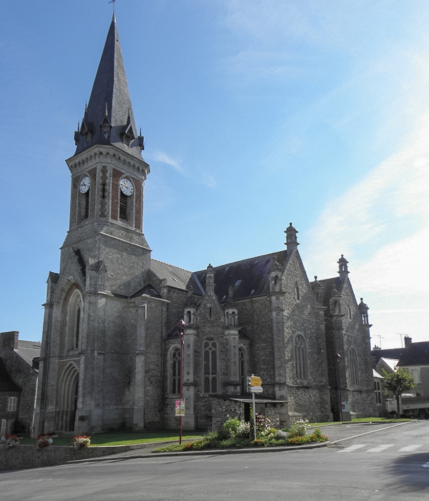 Église paroissiale Saint-Pierre à Coësmes (35).